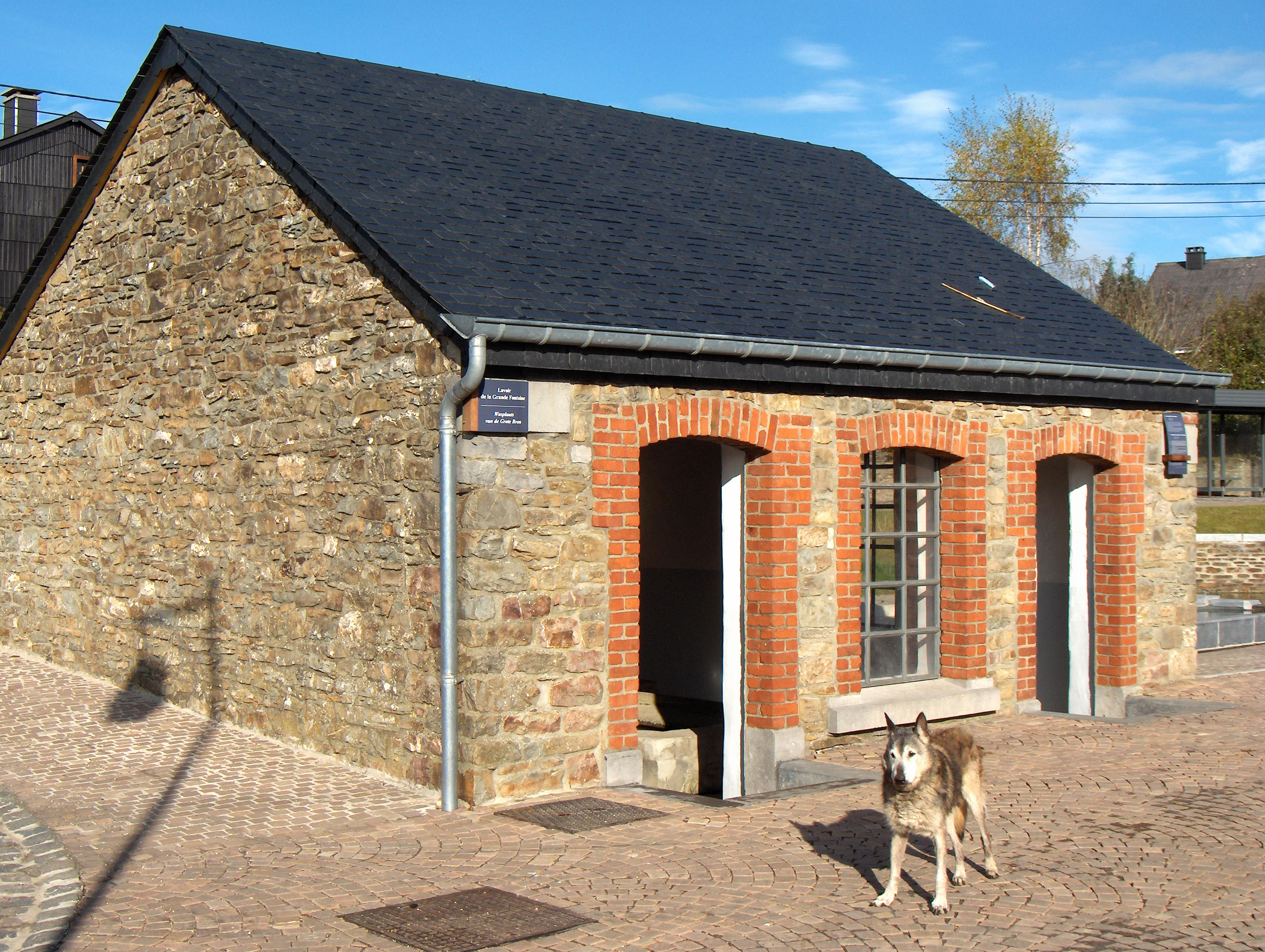 Beschreibung: Transinne, Ortsteil der Gemeinde Libin (Belgien, Prov. Luxemburg); Dorfbrunnen im Brunnenhaus (lavoir "La Grande Fontaine"), 1862 errichtet und bis 1945 im Gebrauch. Datum: 12. November 2005 Fotograf: Friedrich Tellberg